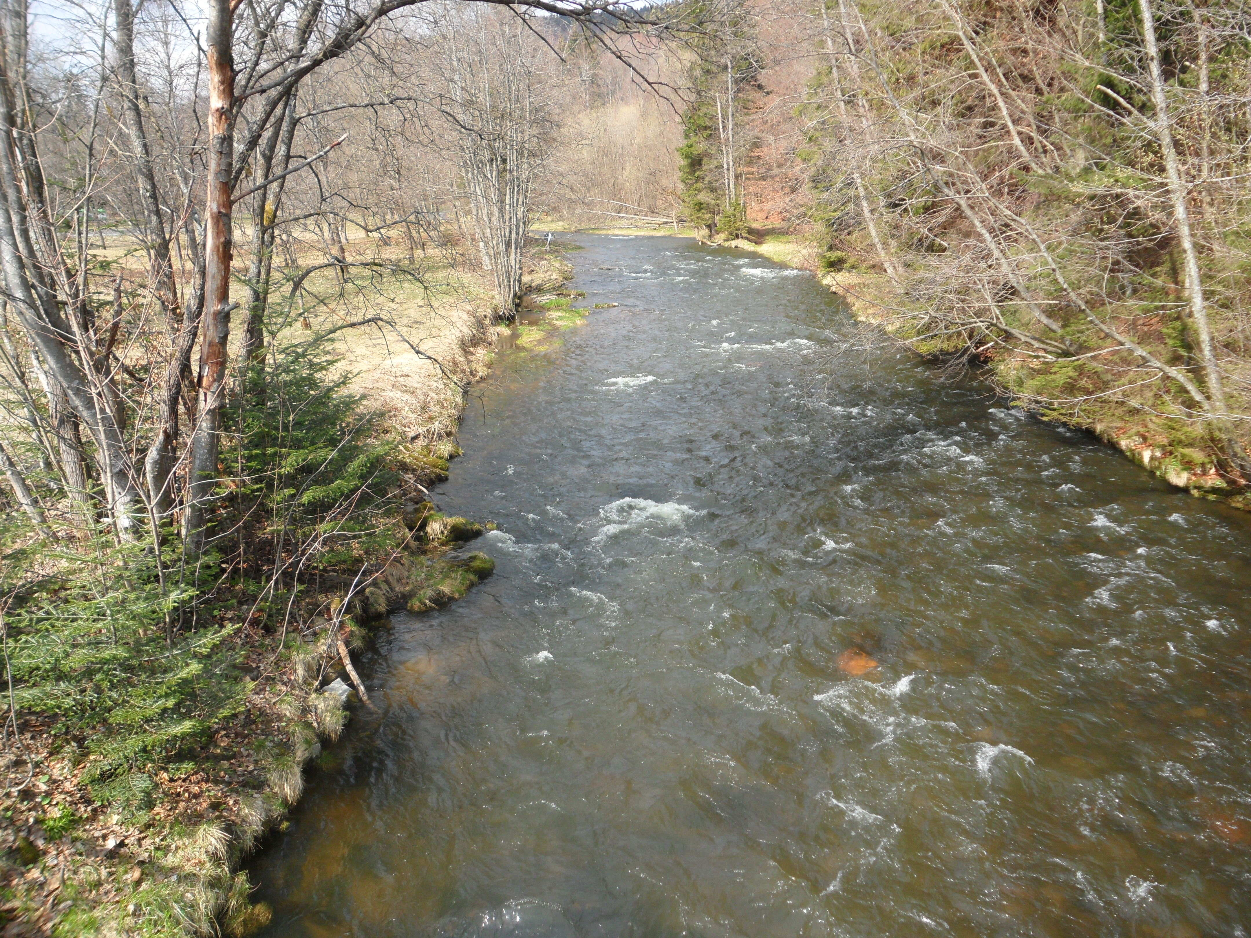 Der Große Regen bei Bayerisch Eisenstein